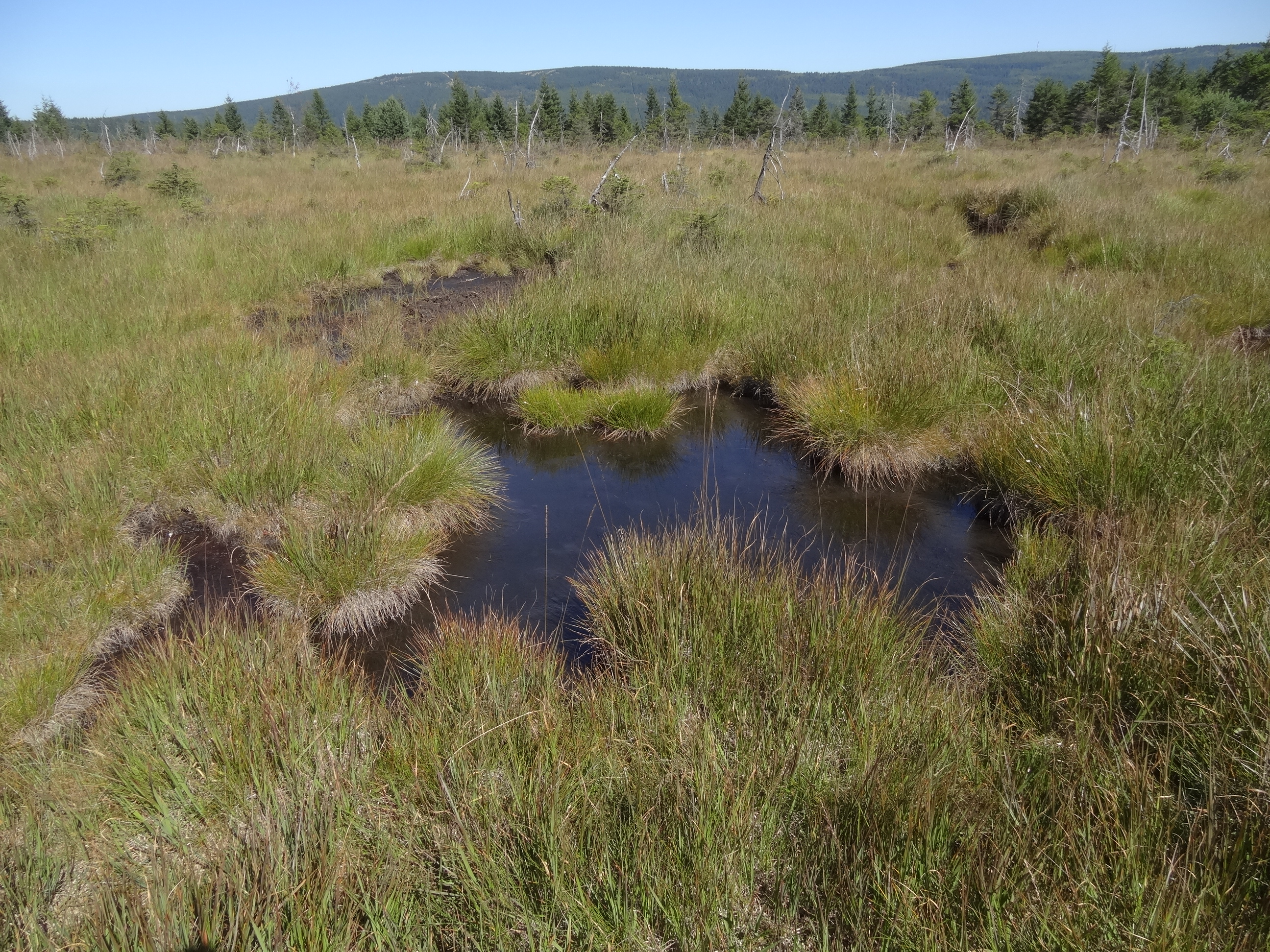 PP Quarré chrání vrchoviště náhorního typu s výskytem vzácných a ohrožených druhů rostlin.